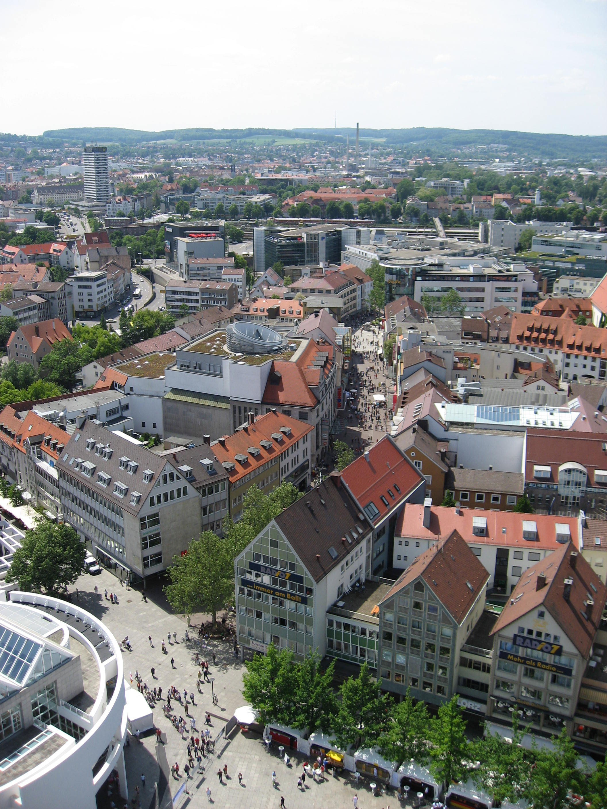 Ulm, Germany. View from the cathedral to Münsterplatz and Hirschstraße with postwar architecture. Ulm, Blick vom Münster in Richtung Westen mit Münsterplatz und Fußgängerzone. Links unten angeschnitten das Stadthaus von Richard Meier. Dieser Teil der Stadt besteht heute aufgrund der fast vollständigen Zerstörung im Zweiten Weltkrieg fast gänzlich aus moderner Architektur.